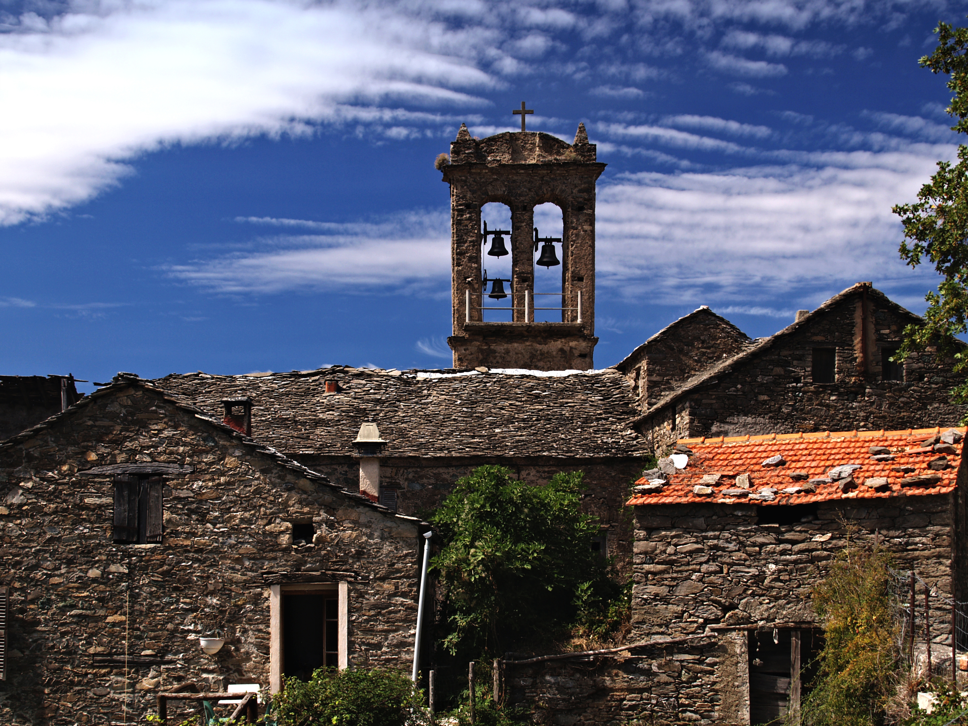 Alando (Corsica) - Ancien couvent franciscain (1525), clocher de l'église conventuelle